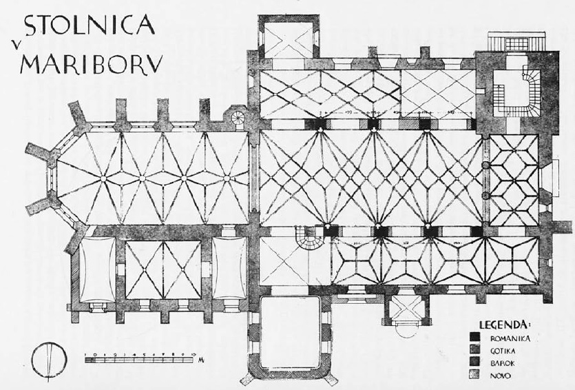 Tloris mariborske stolnice 1943 (Naslikal: Marjan Mušič, inž. arh.)